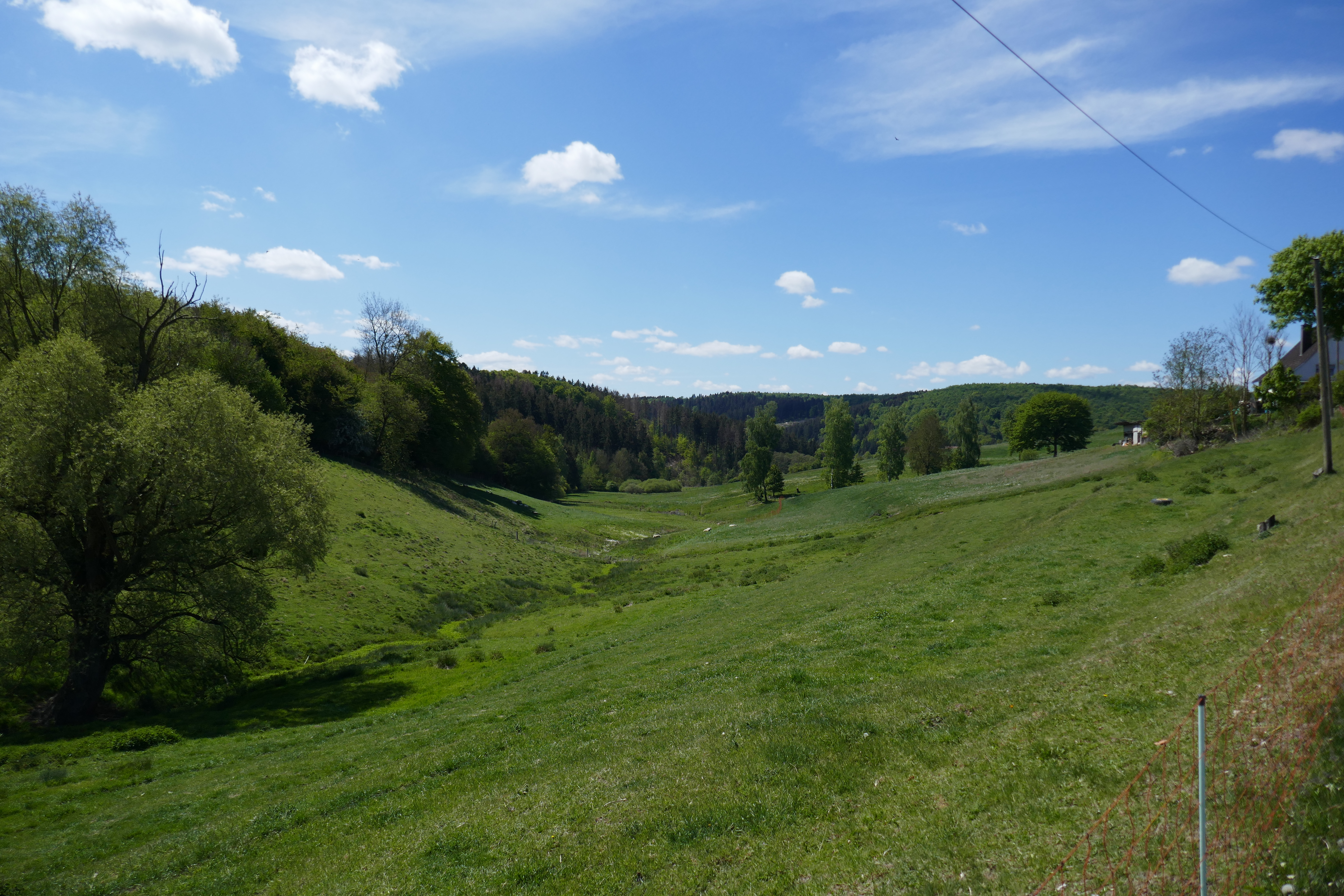 Frankenbachtal südlich von Weiberg im Landschaftsschutzgebiet „Seitentäler von Alme und Afte“ am Rande des Naturschutzgebiets „Leiberger Wald“